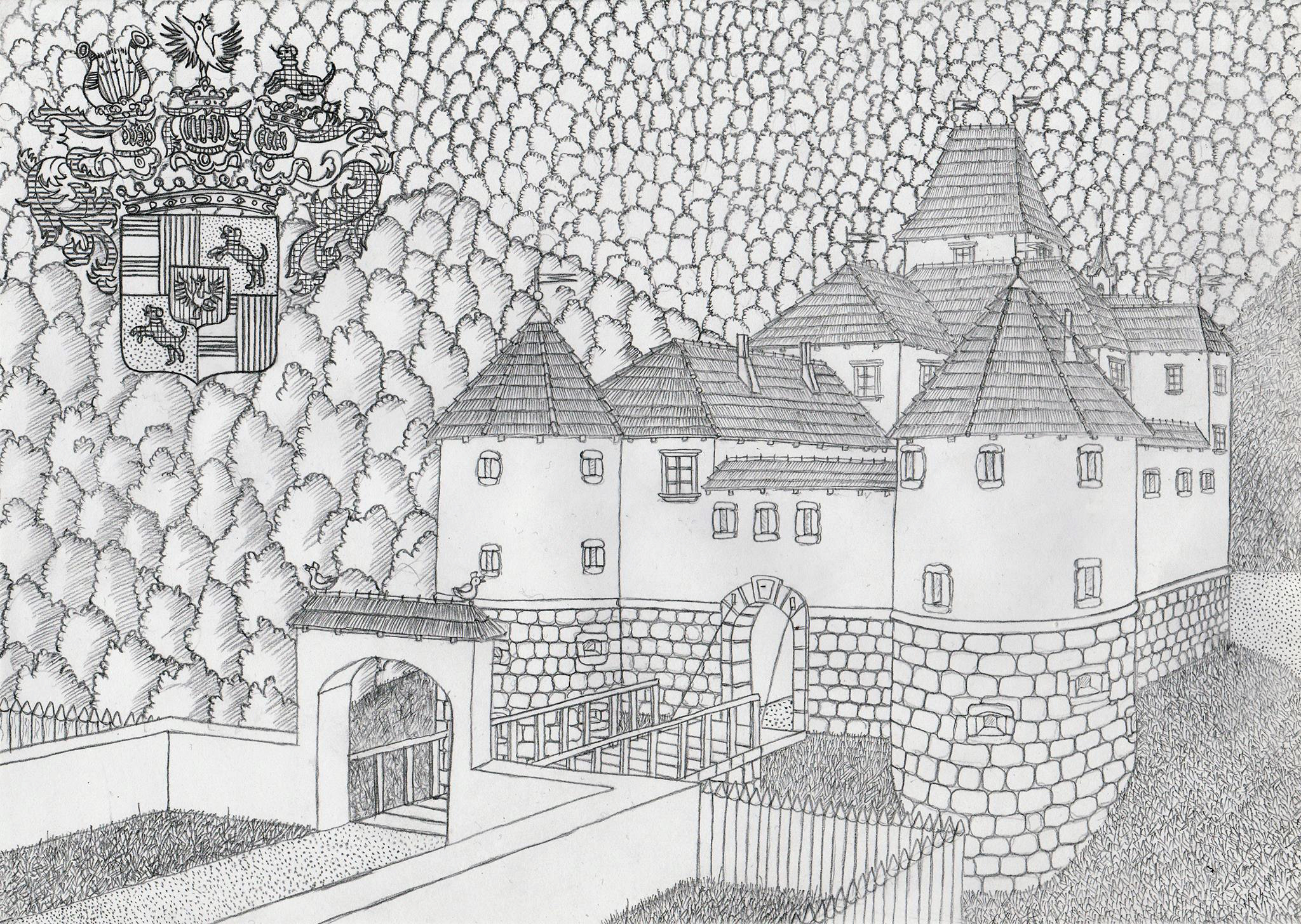 Poskus Rekonstrukcije gradu Boštanj pri Sevnici v 16. stol. Delano s pomočjo skicne osnove doc. dr. Igorja Sapača in tlorisa, ki ga je zrisal Ivo Gričar. Grb plemiške družine Lamberg, linije Sauensteinischer